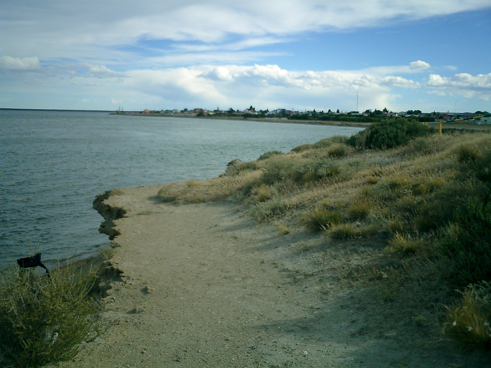 Bahia de Puerto San Julián